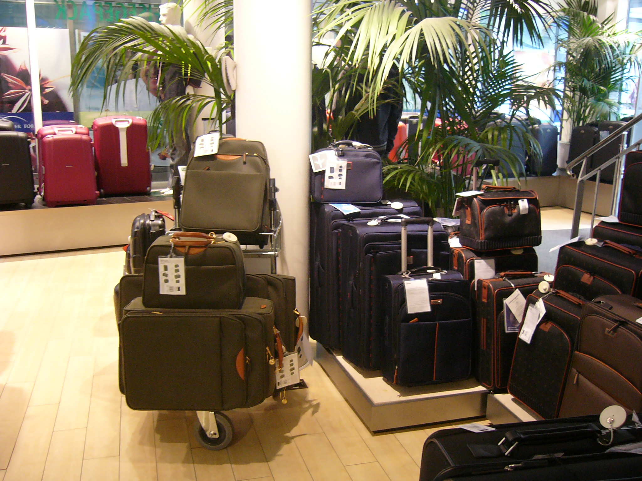 Reisegepäck